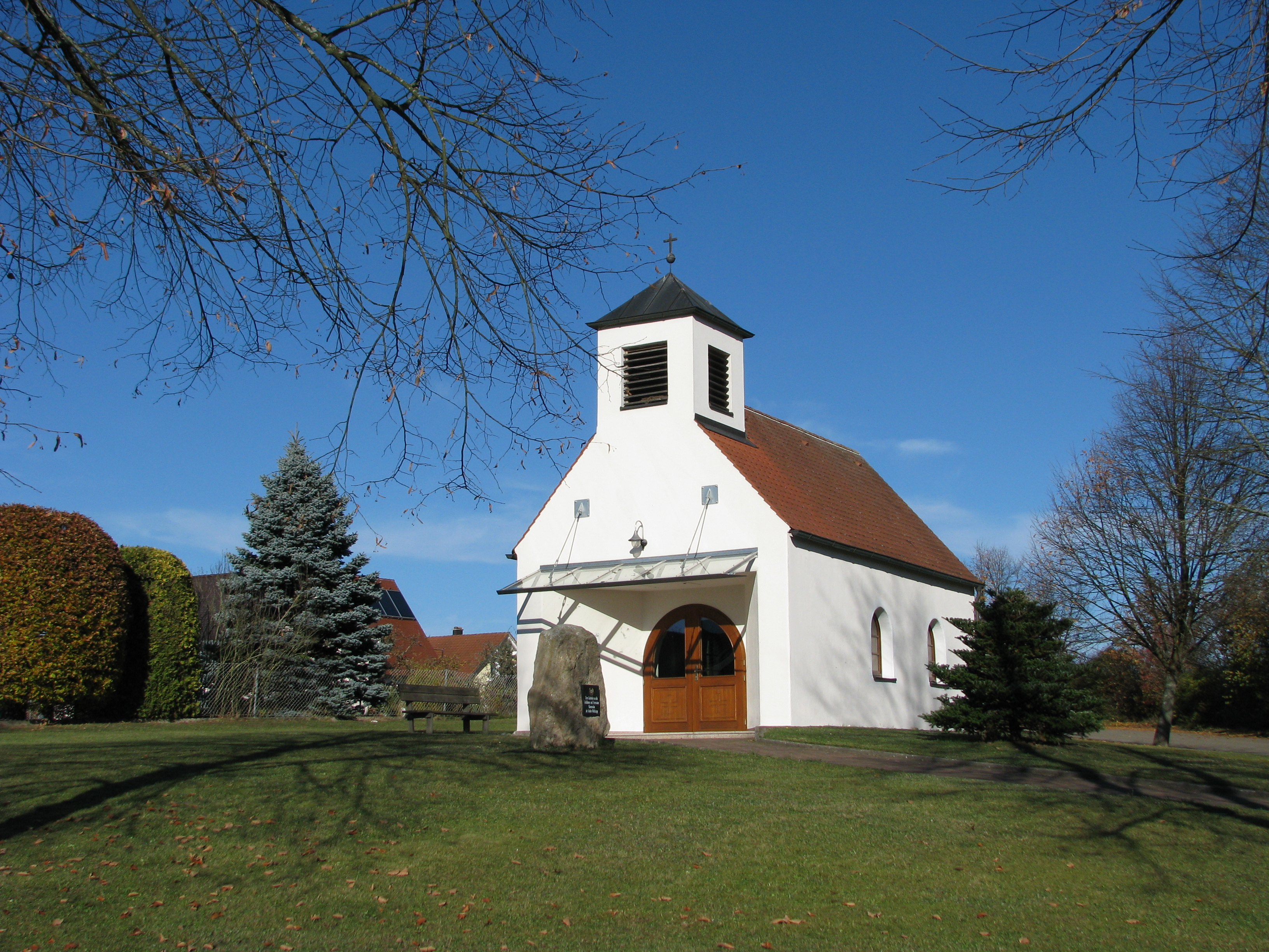 Unterrödel, Ortsteil von Hilpoltstein im mittelfränkischen Landkreis Roth, Florianskapelle der Freiwilligen Feuerwehr Unterrödel, 1999 erbaut